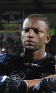 IDV vs MUNICIPAL